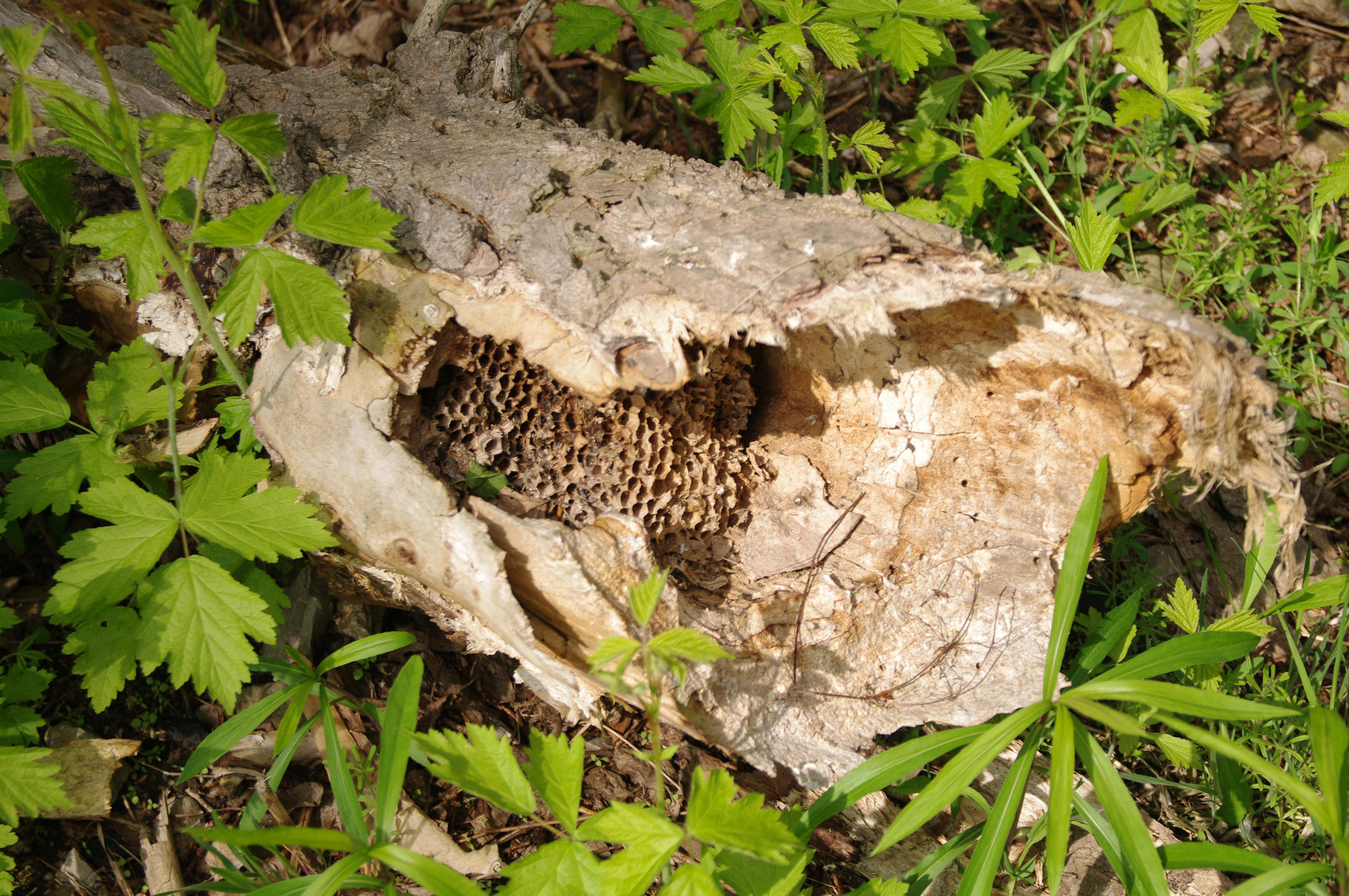 Gniazdo szerszeni w zwalonym pniu drzewa, Las Bemowski